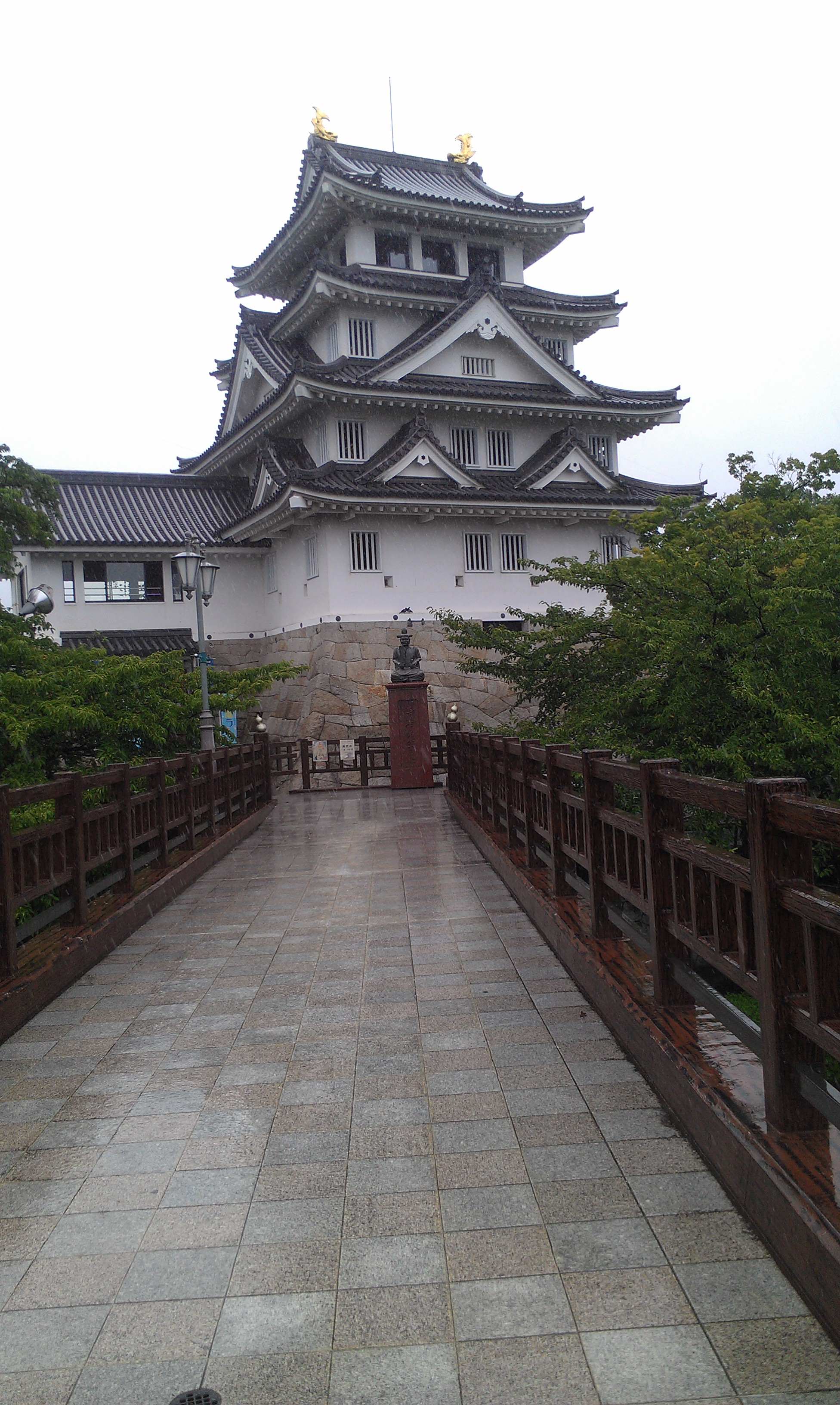 岐阜大垣市墨侯一夜城